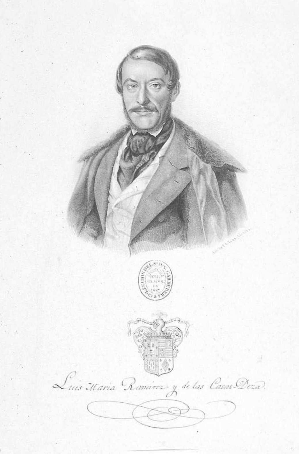 Retrato de Luis Ramírez Casas-Deza, litografía de Tena (Córdoba). Biblioteca Nacional de España